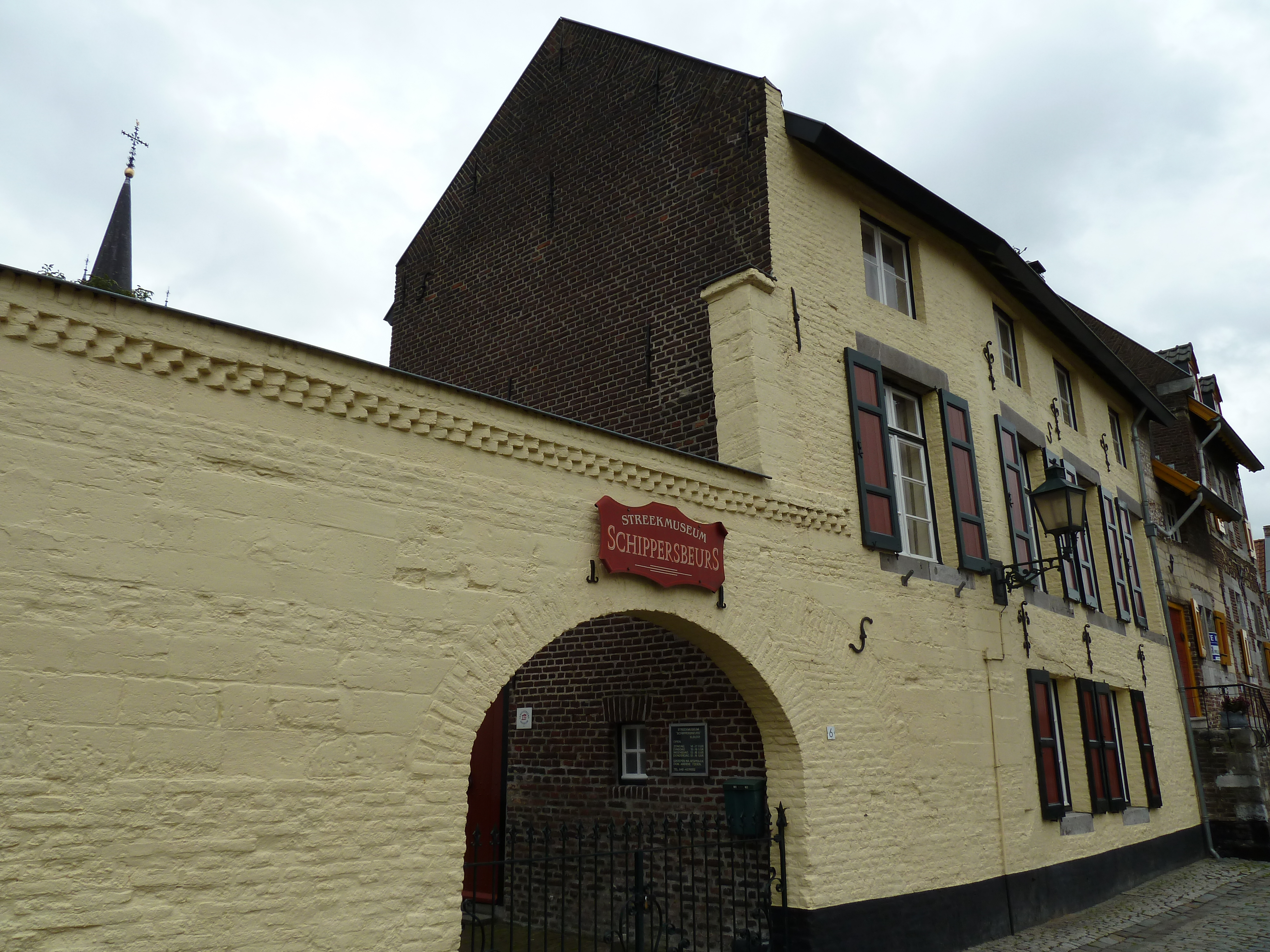 Op de Berg 6, Elsloo, Limburg, Nederland